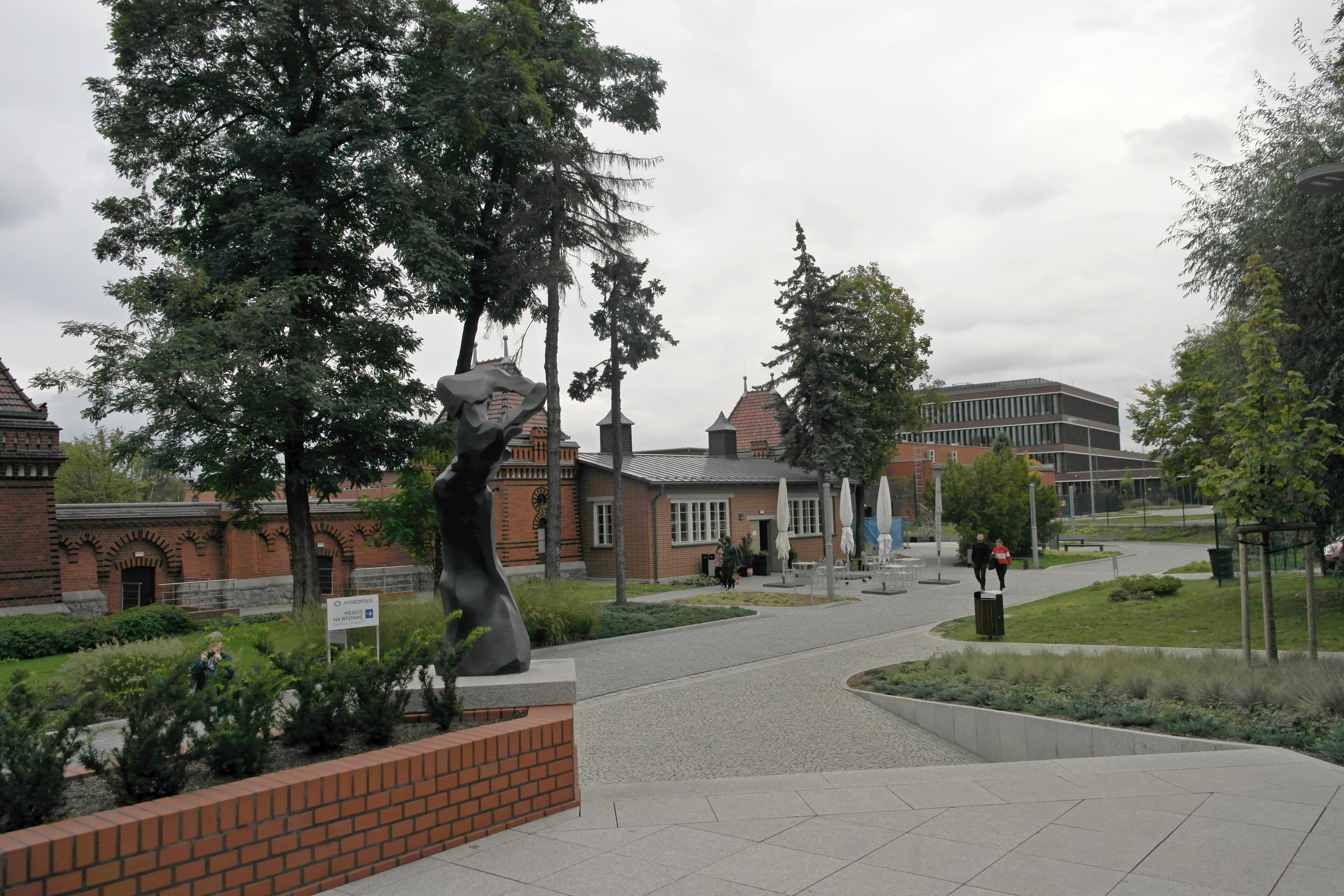 Teren wejściowy